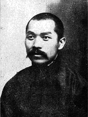 中文（台灣）: 中華民國國會議員